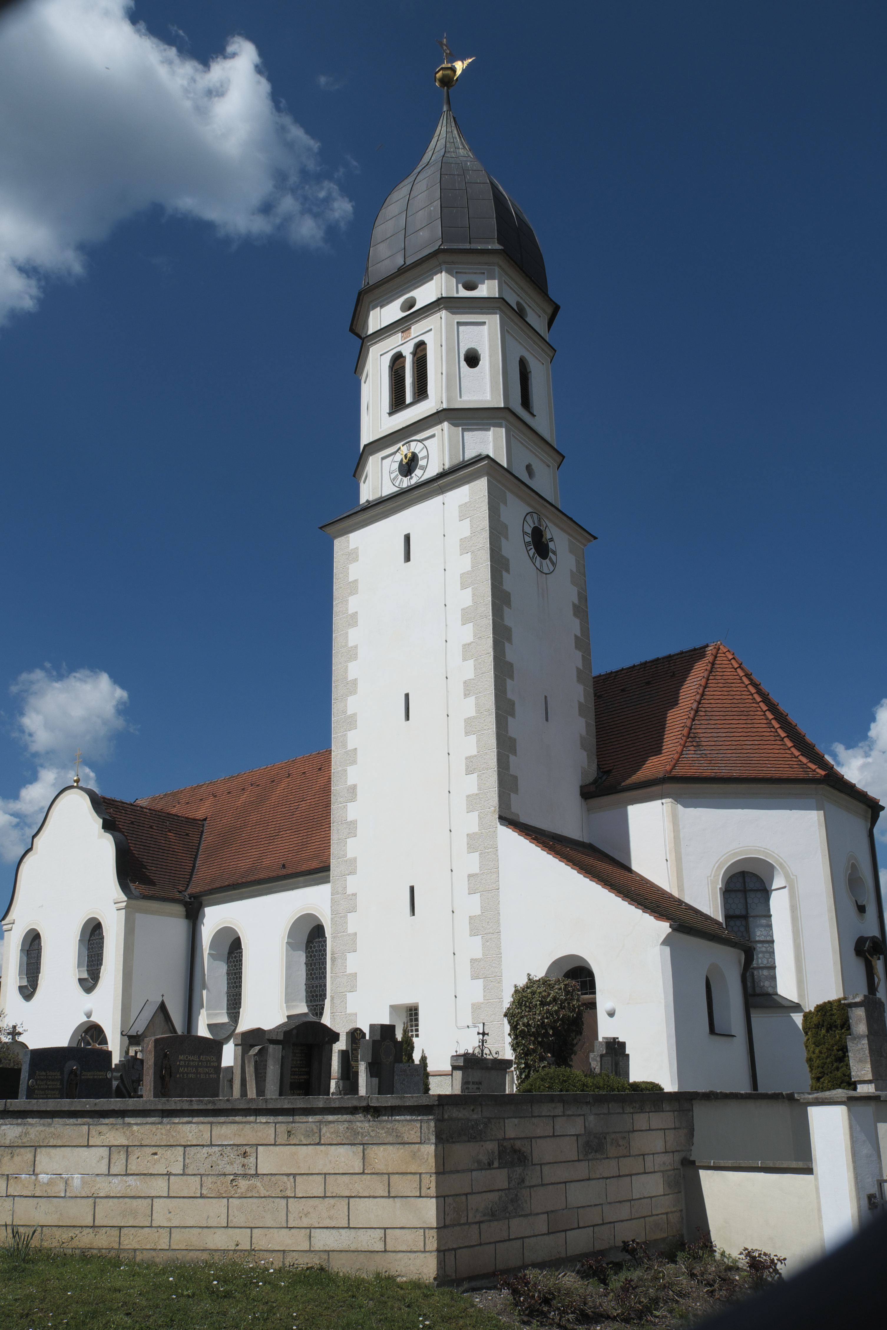 Katholische Pfarrkirche St. Mauritius in Oberhausen im Landkreis Weilheim-Schongau (Bayern/Deutschland)